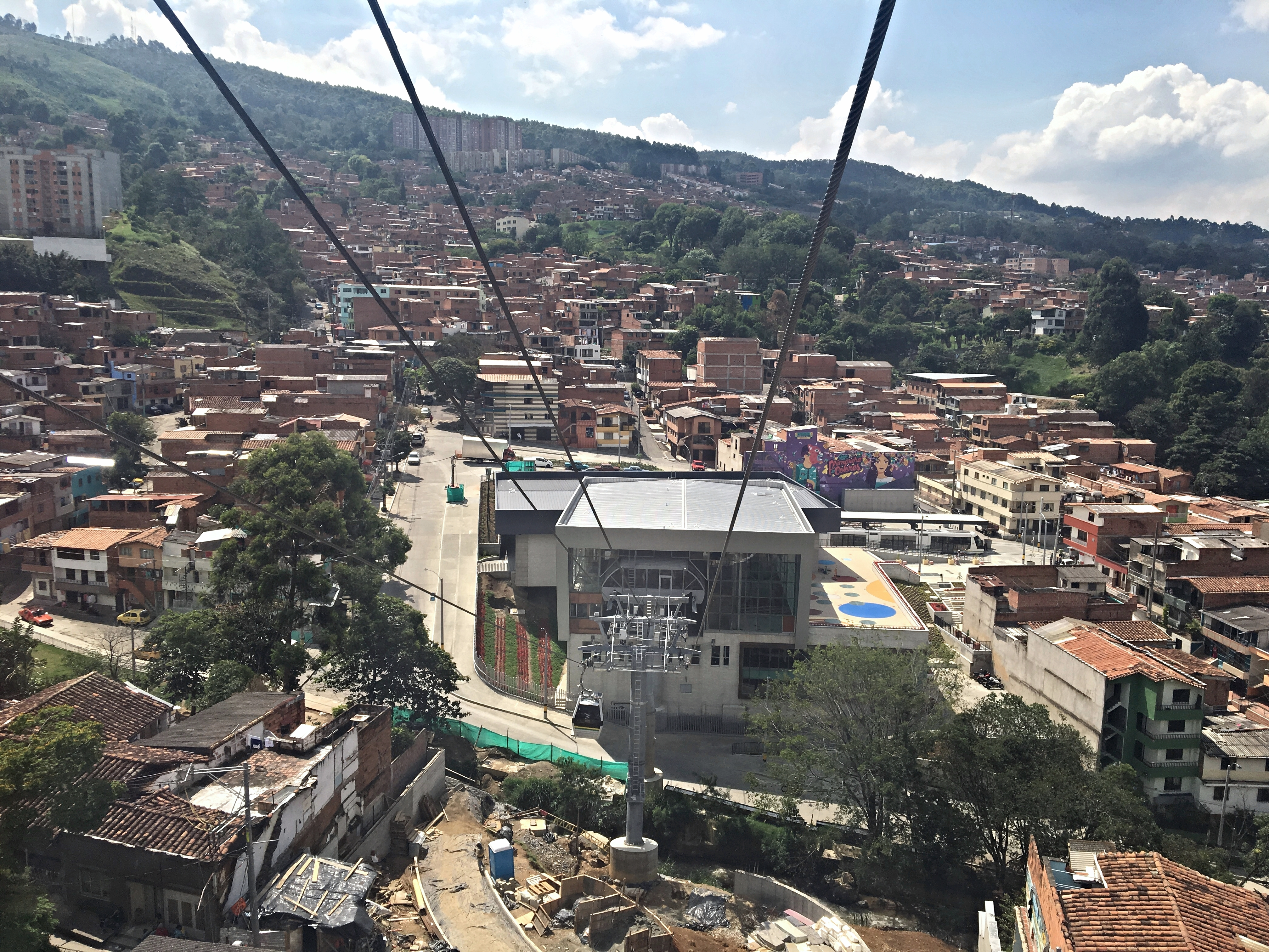 Estación Oriente (Metro de Medellín)